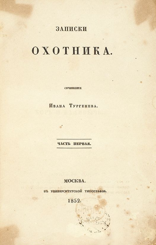 Notes of a Hunter. The title page of the first edition. 1852